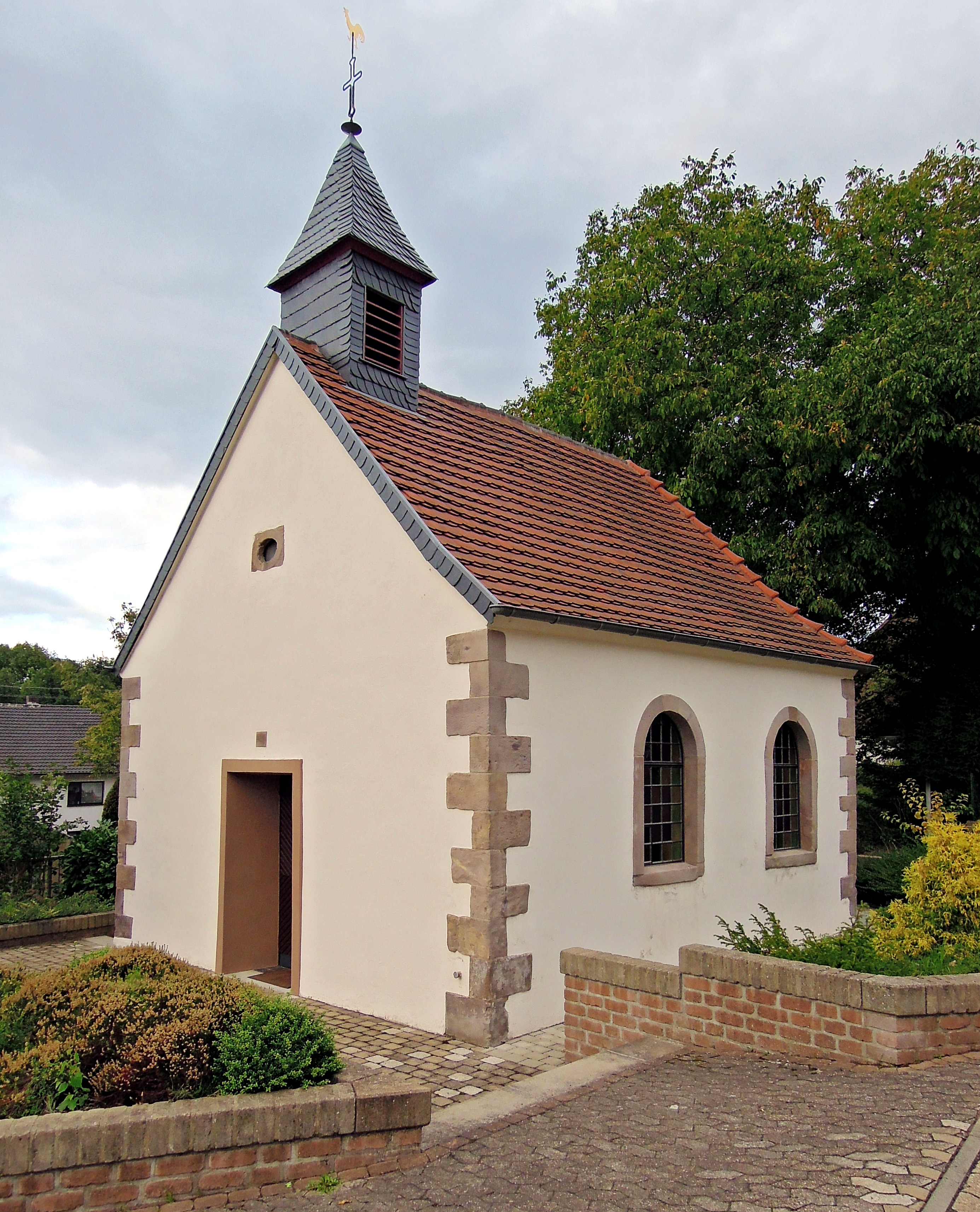 Körpricher Straße, kath. Kapelle St. Luzia, 1811 (Einzeldenkmal)